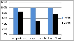 Grafico